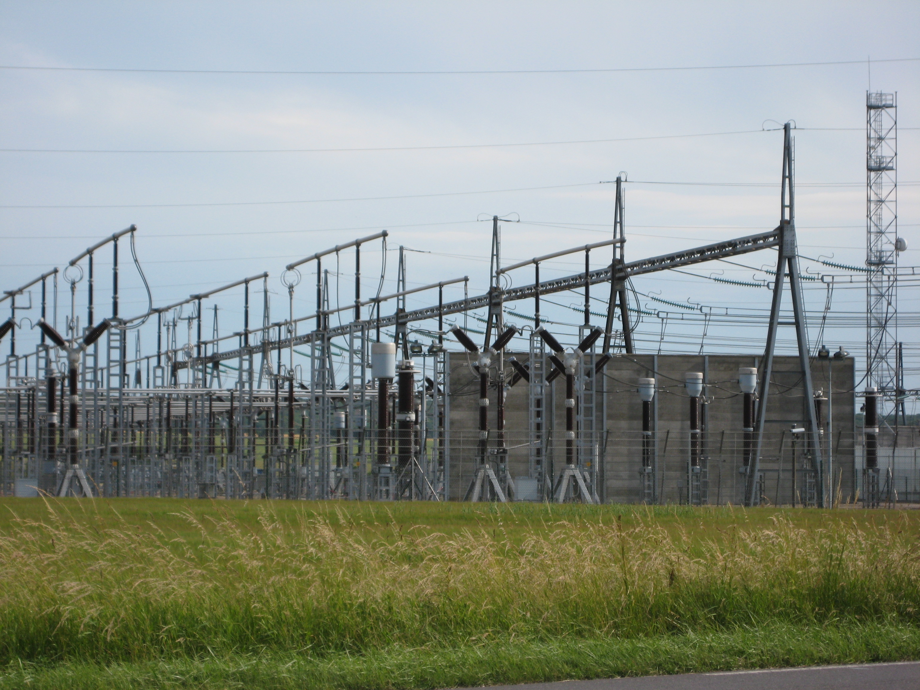 Poste HT Vigy (Moselle)